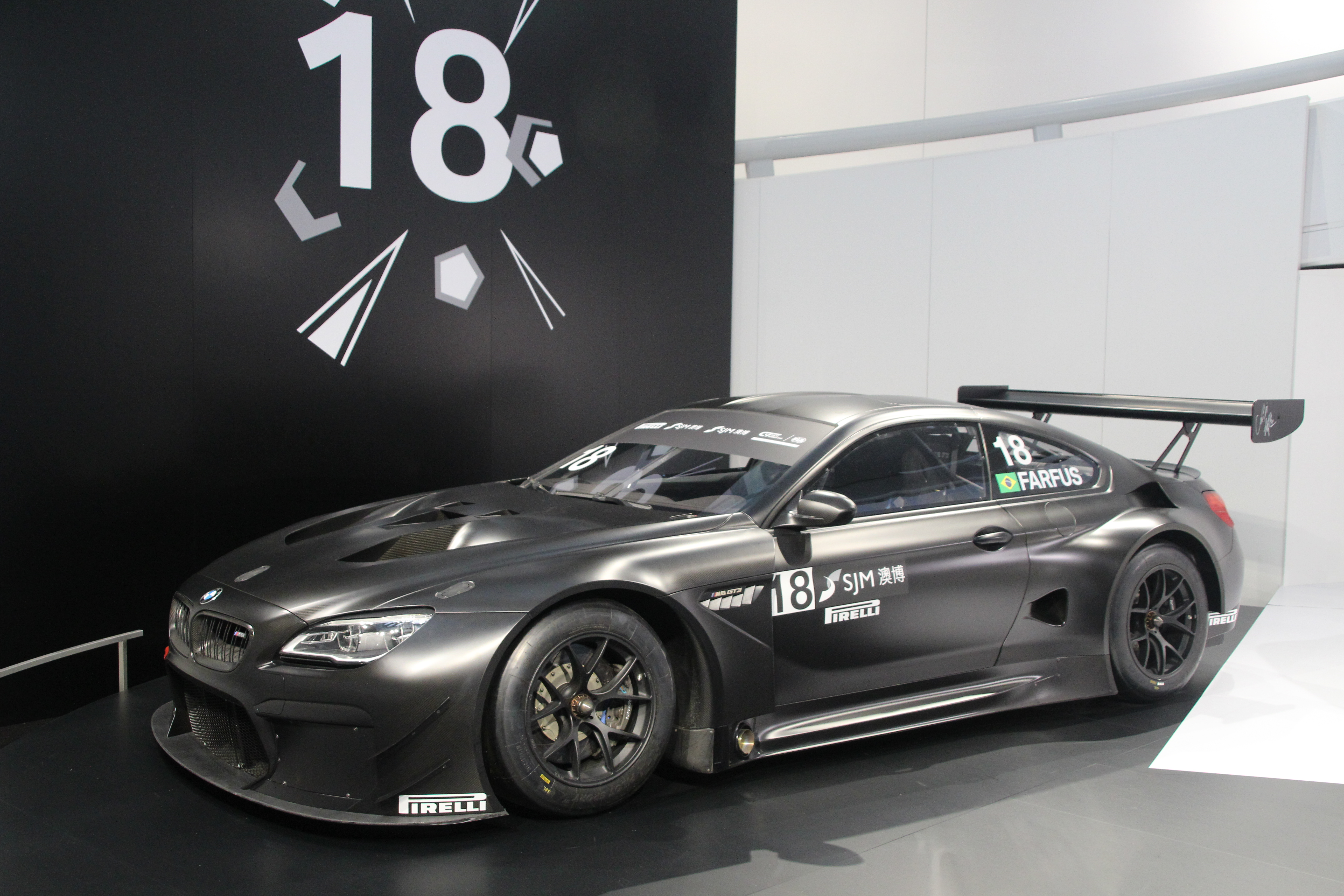 Rennwagen an sich ohne digitale Installation.